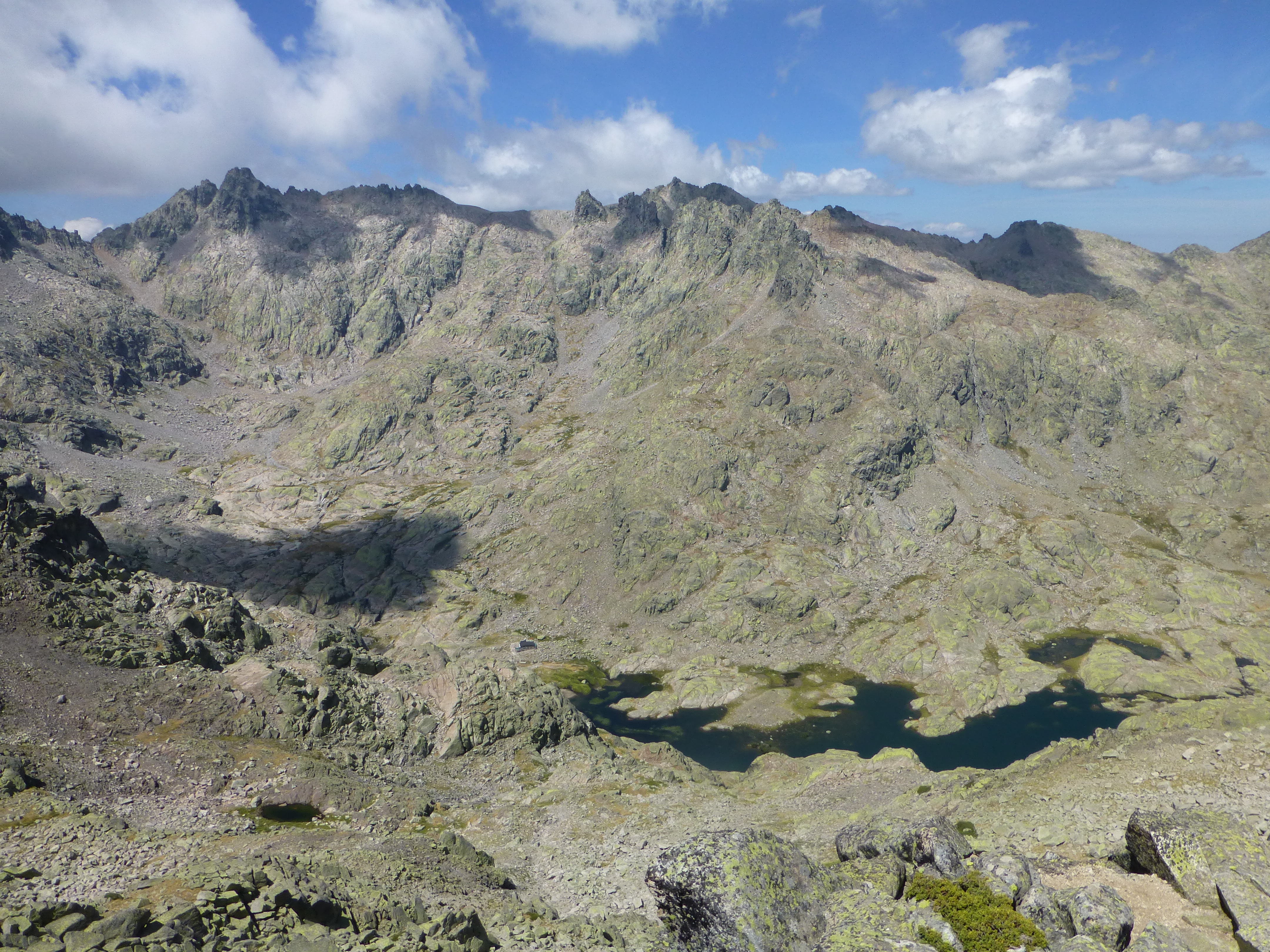 El Circo de Gredos visto desde la cumbre del Morezón. Ávila, Castilla y León, España.